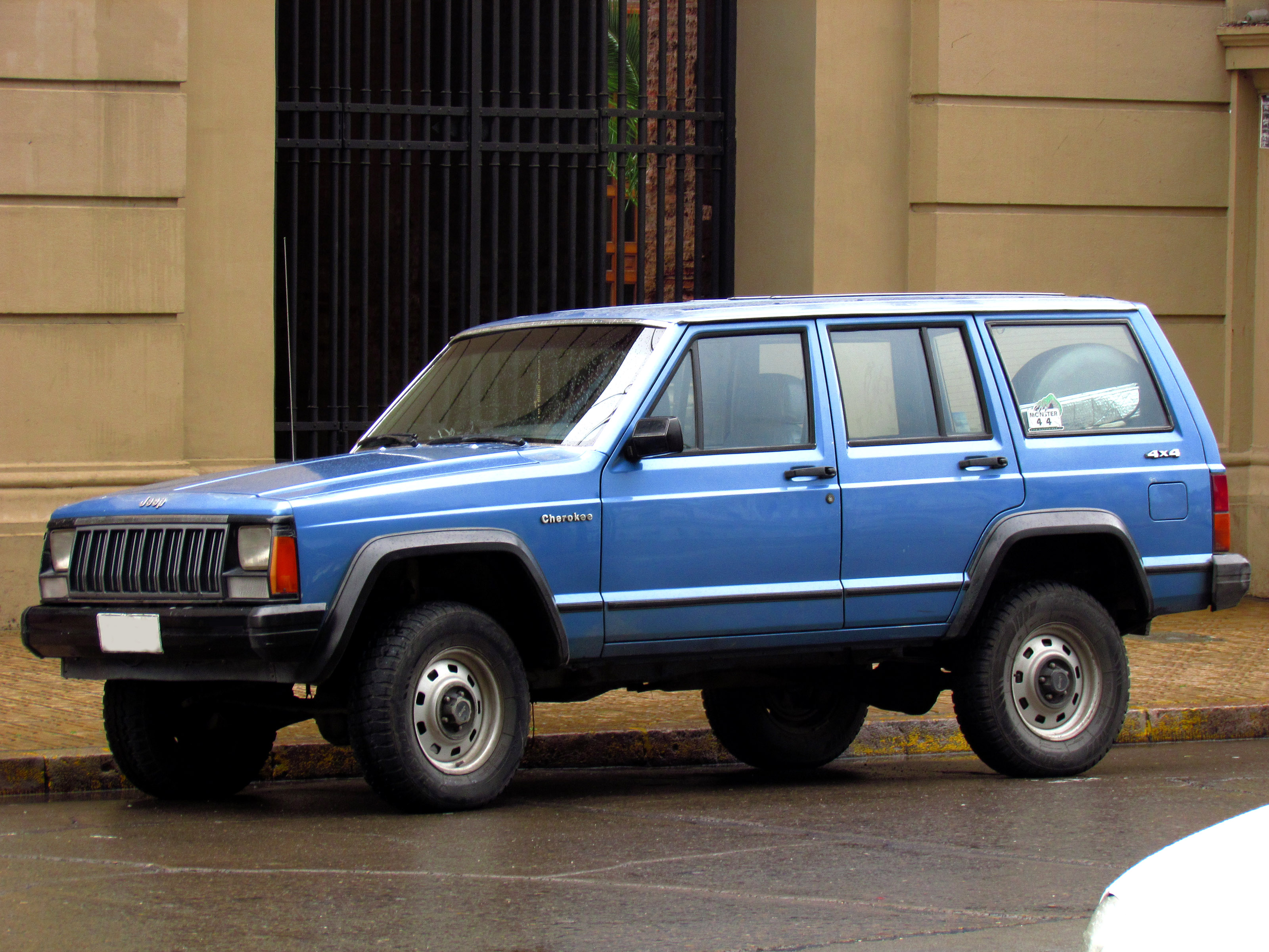 Jeep Cherokee 2.5 1988